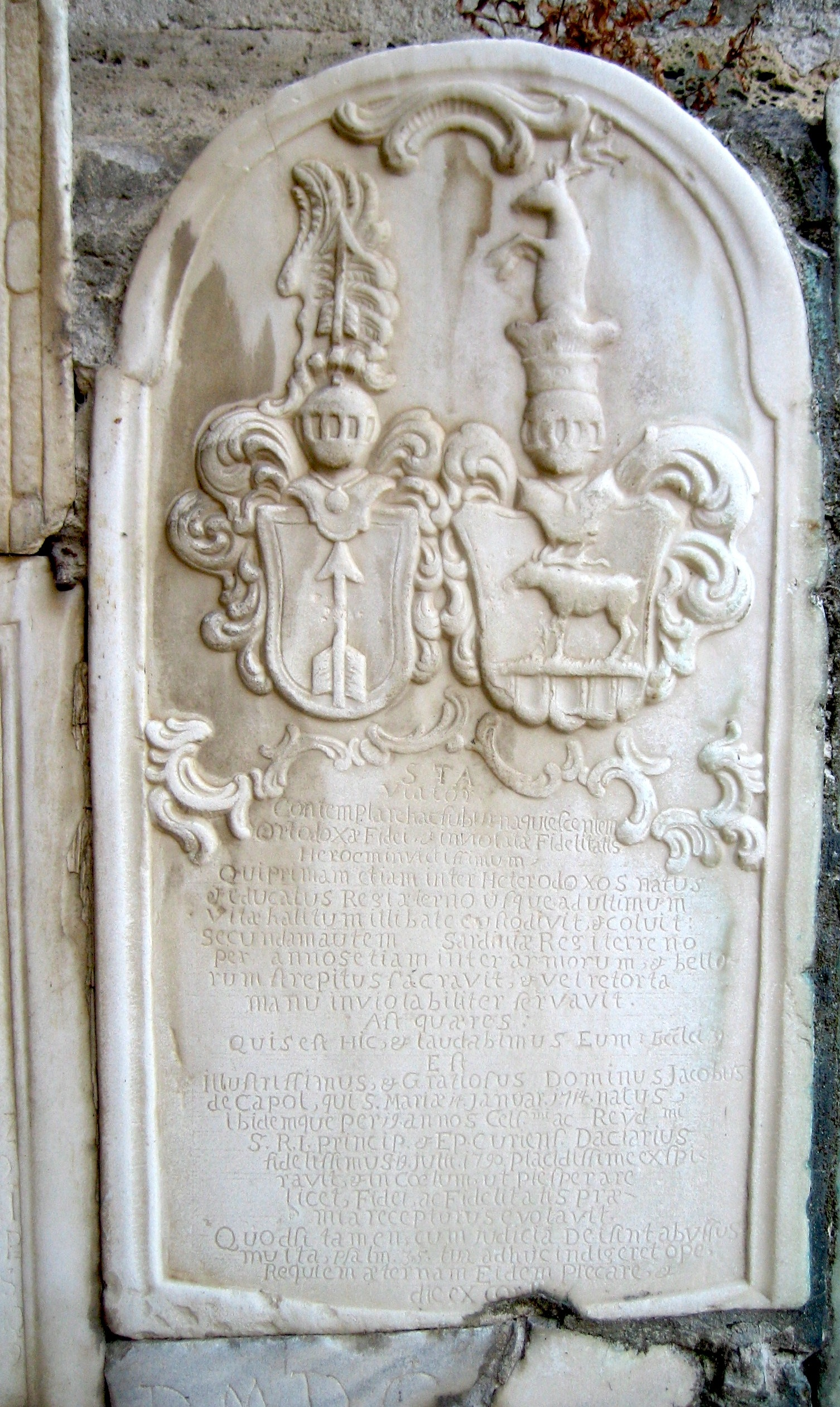 Grabplatte von Jacob de Capol, Valchava, katholischer Pfarrer und Autor romanischer Schriften um 1770, vor dem Kloster Müstair